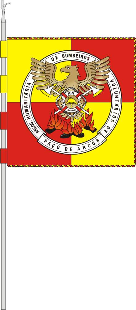 Guião dos Corpo de Bombeiros Voluntários da Associação Humanitária de Bombeiros Voluntários de Paço de Arcos